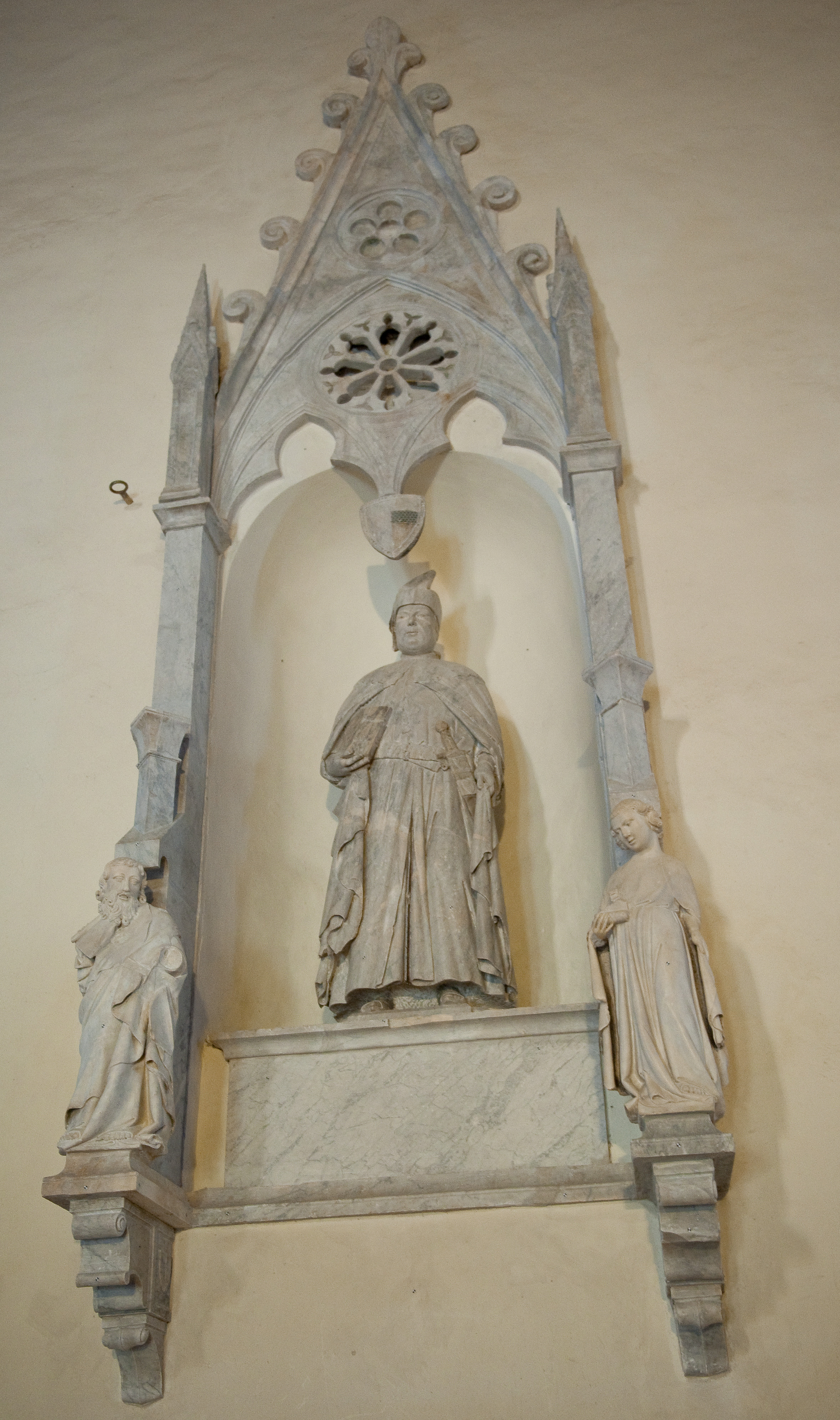 Cenotafio di Beltramo Berlinghieri, attribuito da alcuni a Gano di Fazio e da altri a Marco Romano ( inizio del XIII secolo)